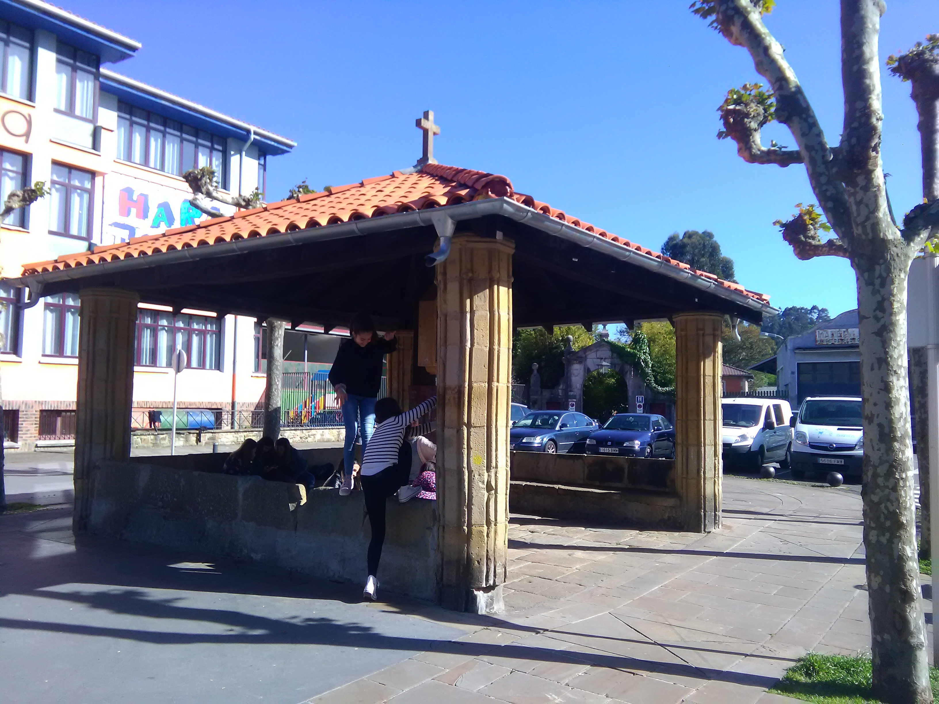 Kristo Portalekoa Lekeitioko (Bizkaia) guruztoki bat da, Ateako errebalean kokatua.